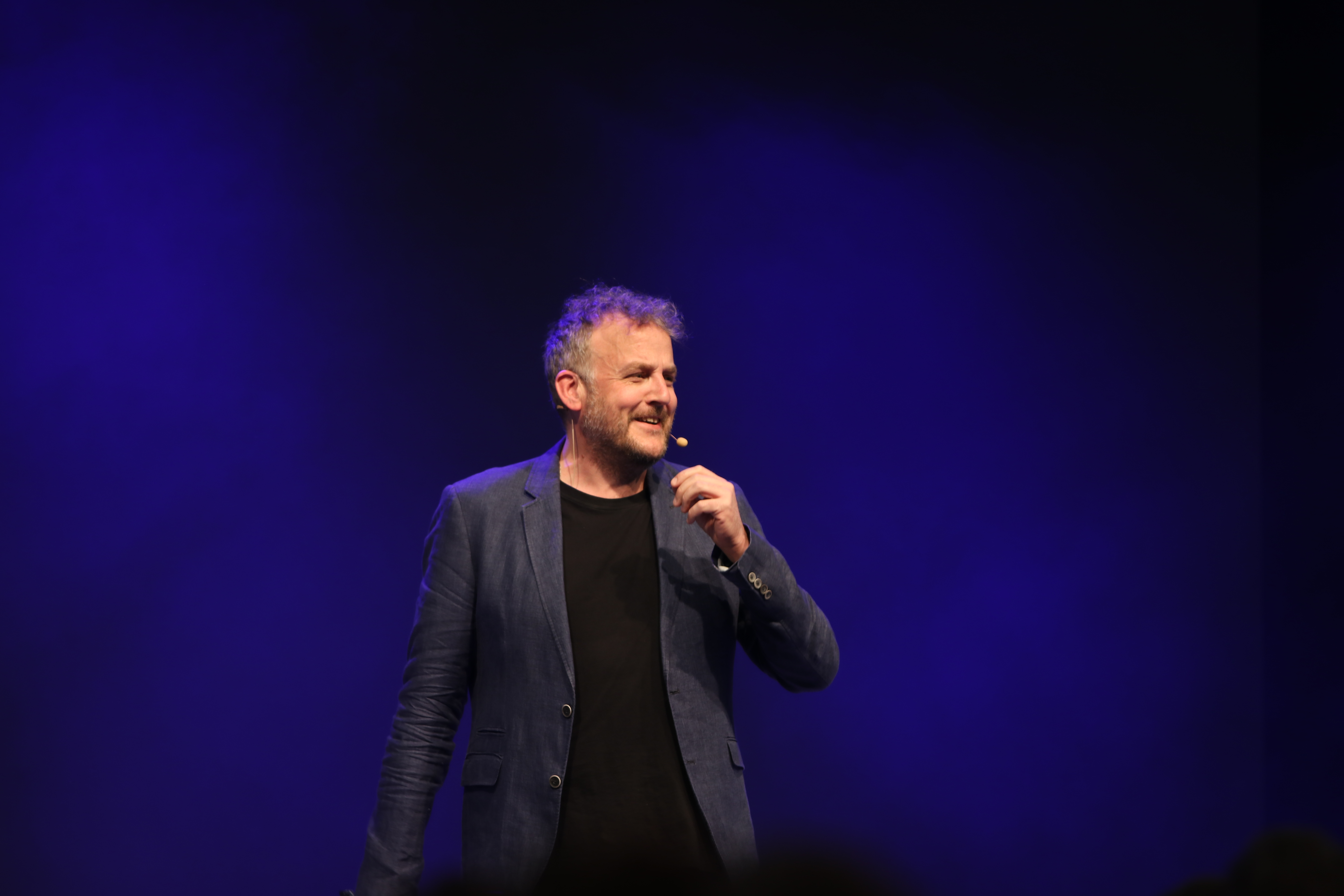 Daniel „Dän“ Dickopf, Wise Guys in München